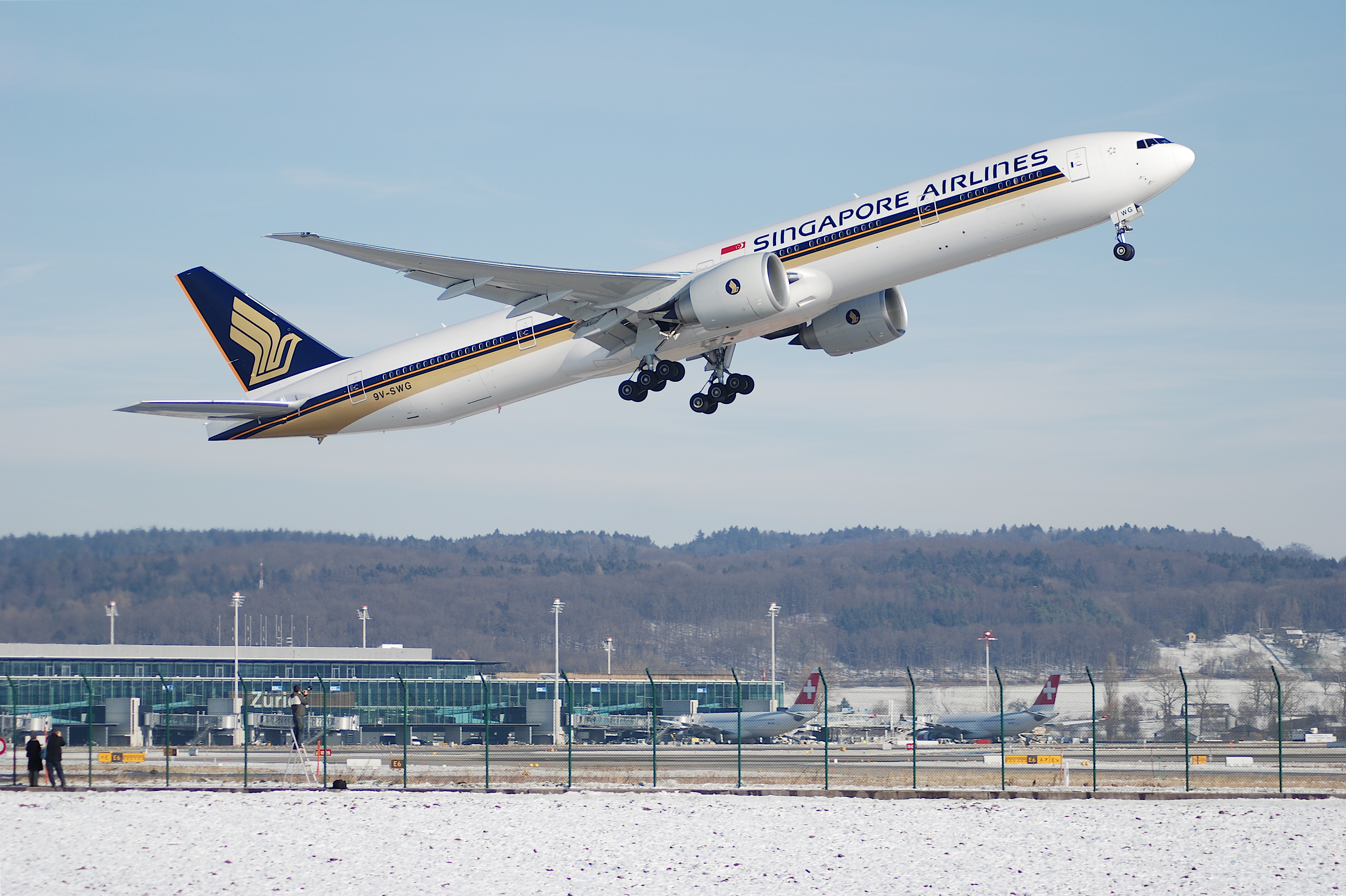 Singapore Airlines Boeing 777-300; 9V-SWG@ZRH;28.01.2007/449br